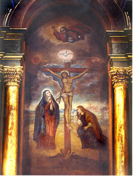 Mural del Señor de los Milagros pintado en el Santuario de Las Nazarenas en Lima (Perú).